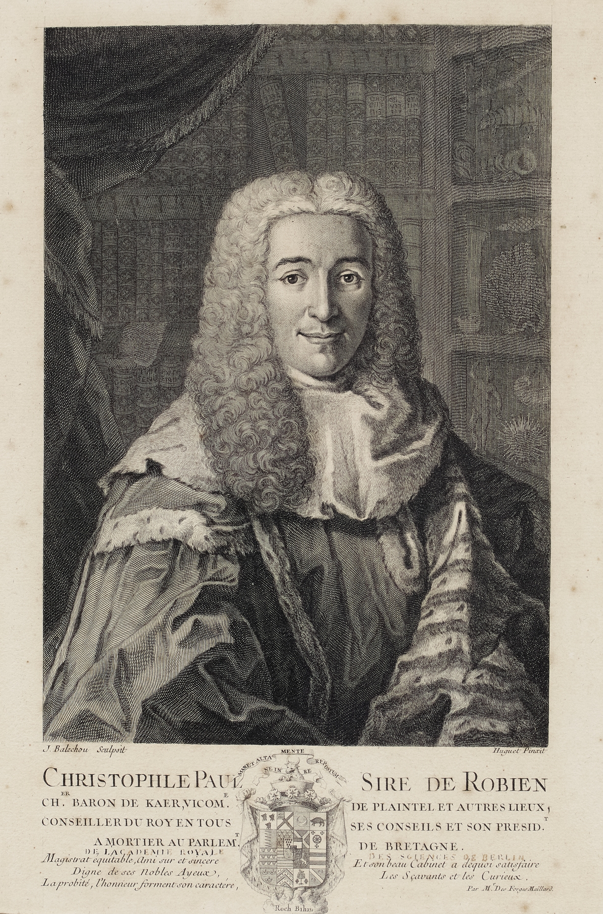 Portrait de Christophe-Paul de Robien